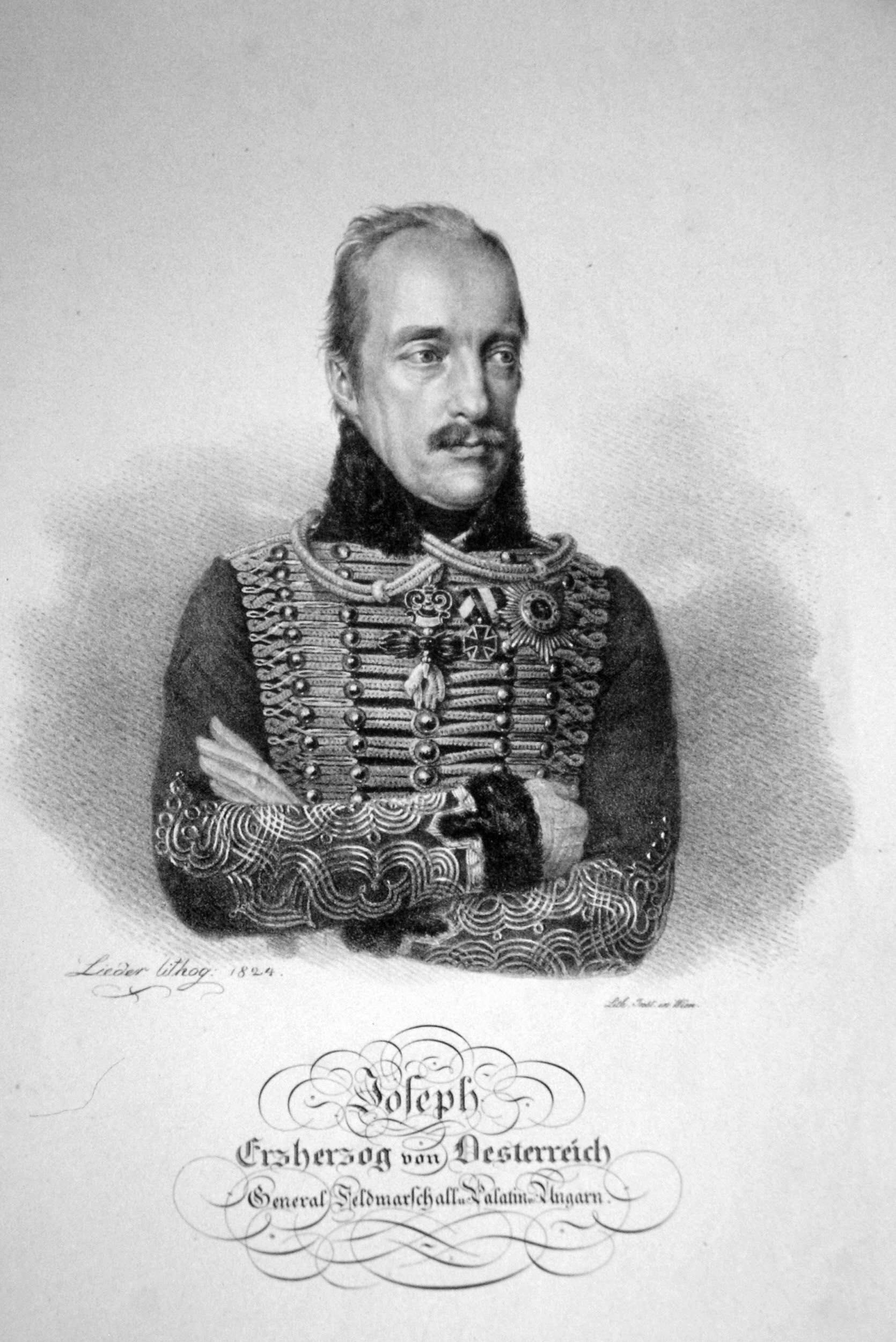 Gioachino Rossini (1792-1868), italienischer Komponist. Lithographie von Friedrich Lieder, um 1830.